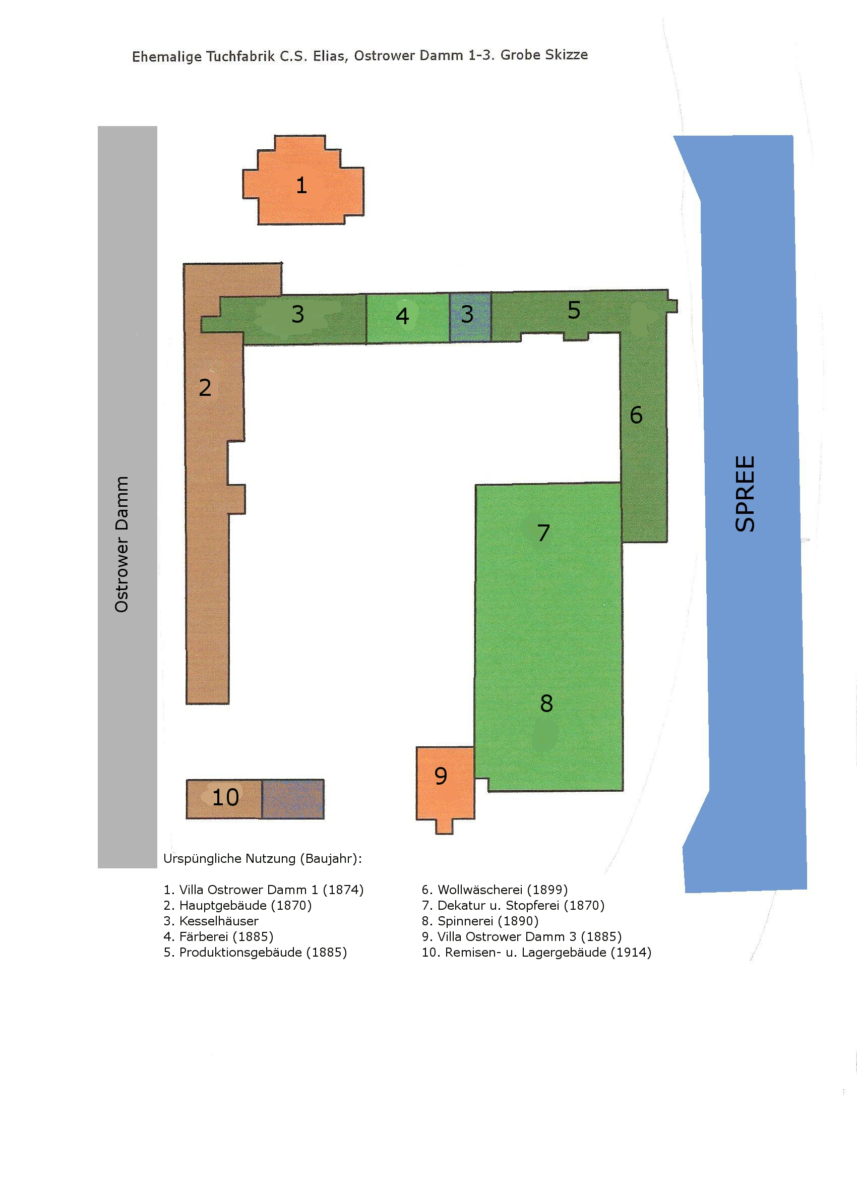 Grobe Skizze der ehemaligen Tuchfabrik C.S. Elias mit ursprünglicher Nutzung der Gebäude